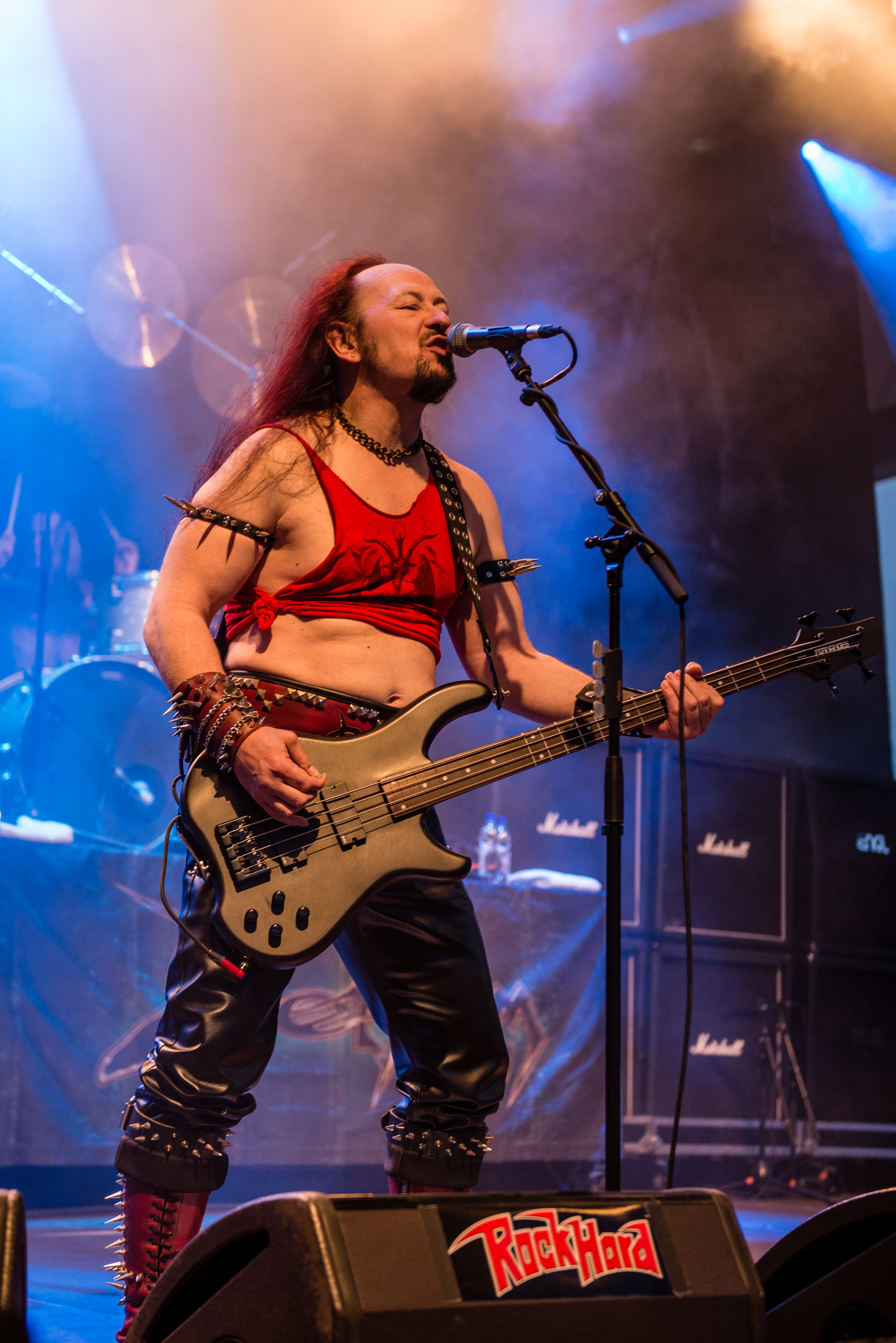 'Rock Hard Festival 2015; Gelsenkirchen Amphitheater': 'Venom'